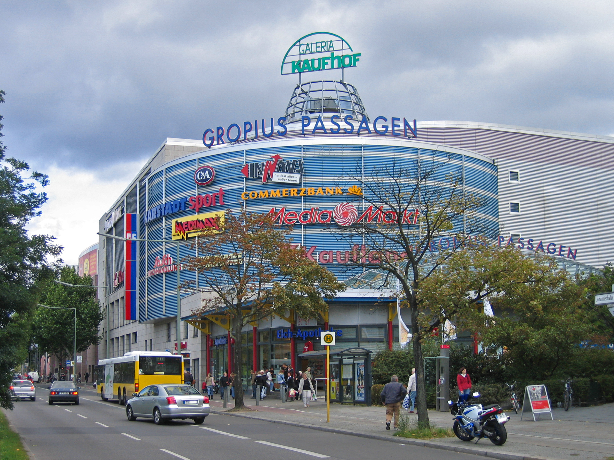 Gropius Passagen, Berlin-Gropiusstadt